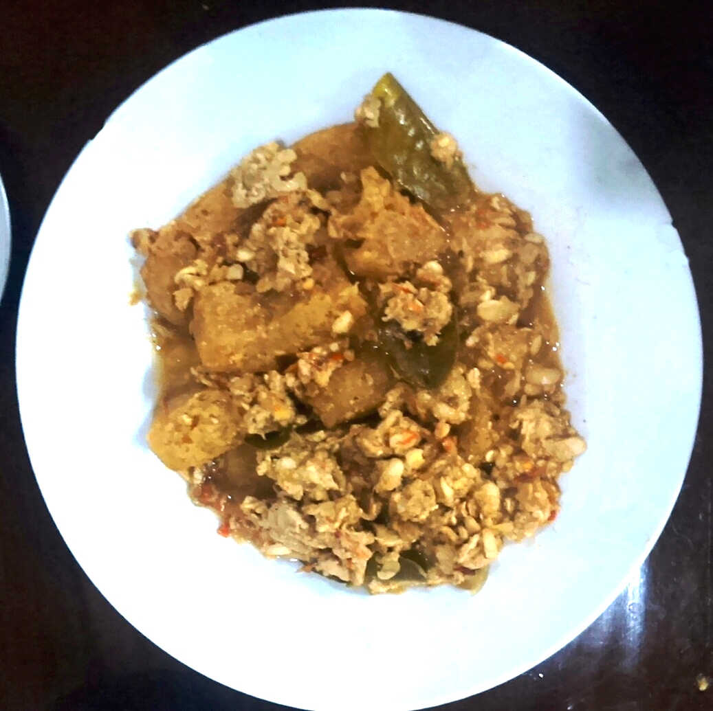 Bumbu tumpang dari Sala / Surakarta